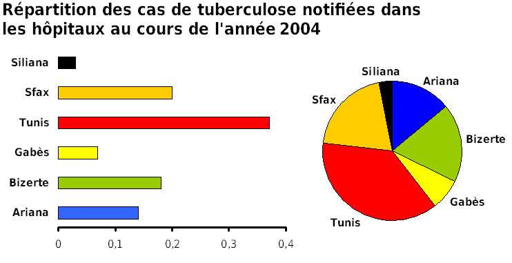 Répartition des cas de tuberculose notifiées dans les hôpitaux des gouvernerats tunisiennes. (D'apès le Bulletin National Epidémilogique, 2004) .